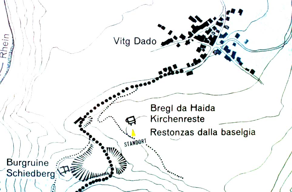 Lage